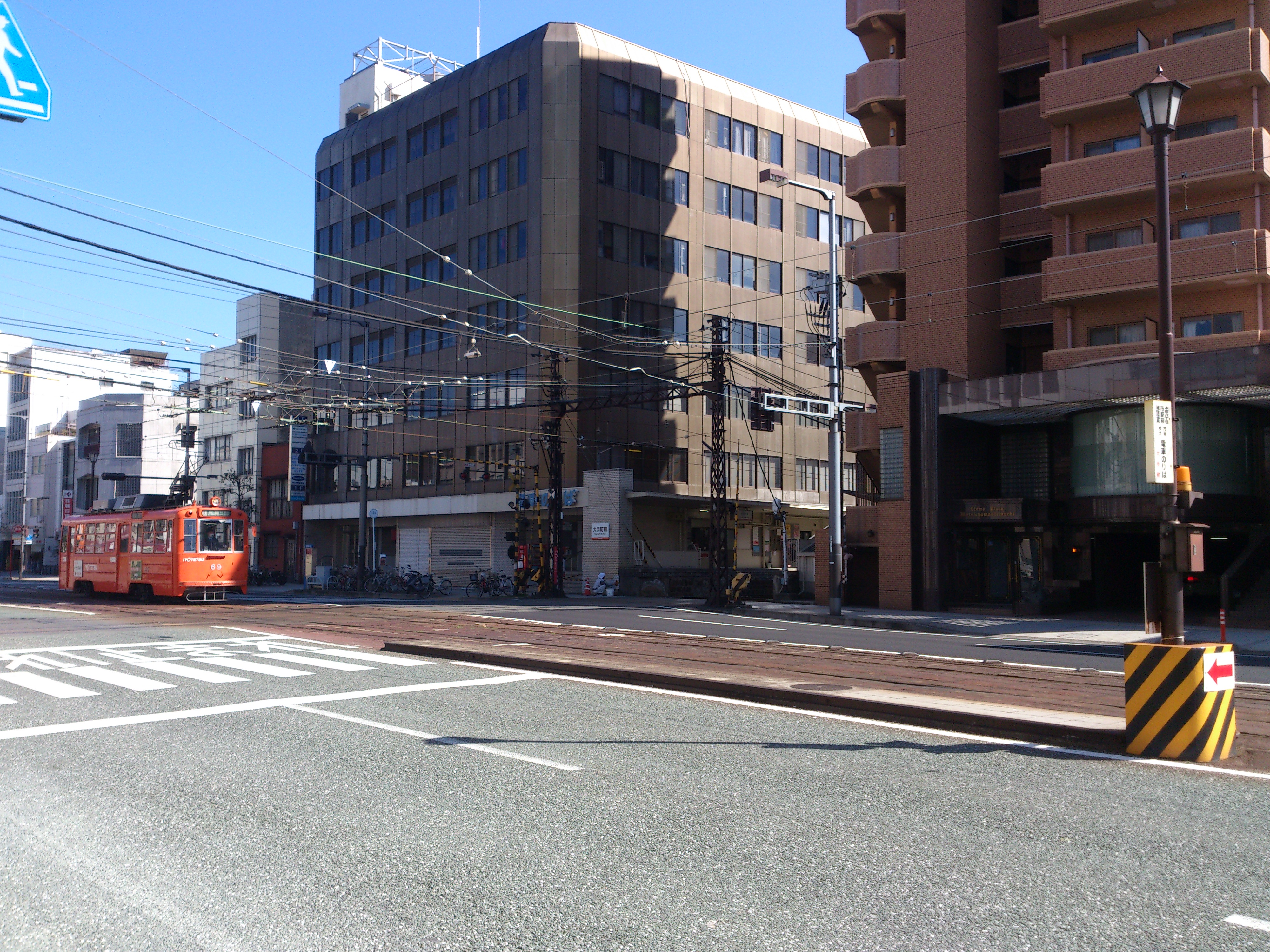 Ōtemachi Station (Ehime)